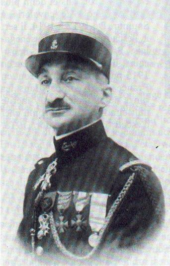 Portretfoto generaal M.E. Deslaurens die op 17 mei 1940 sneuvelde in Vlissingen.